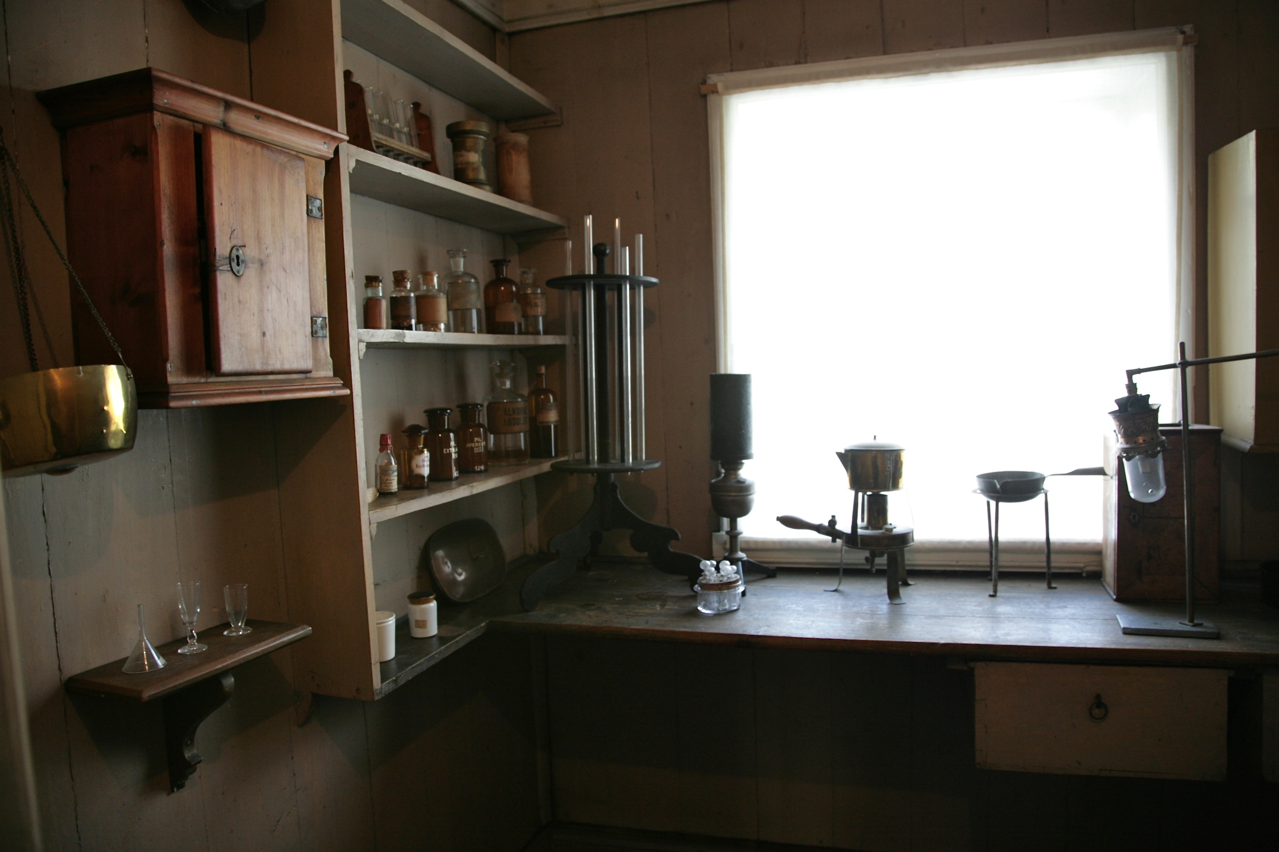 Lepramuseet i Bergen.